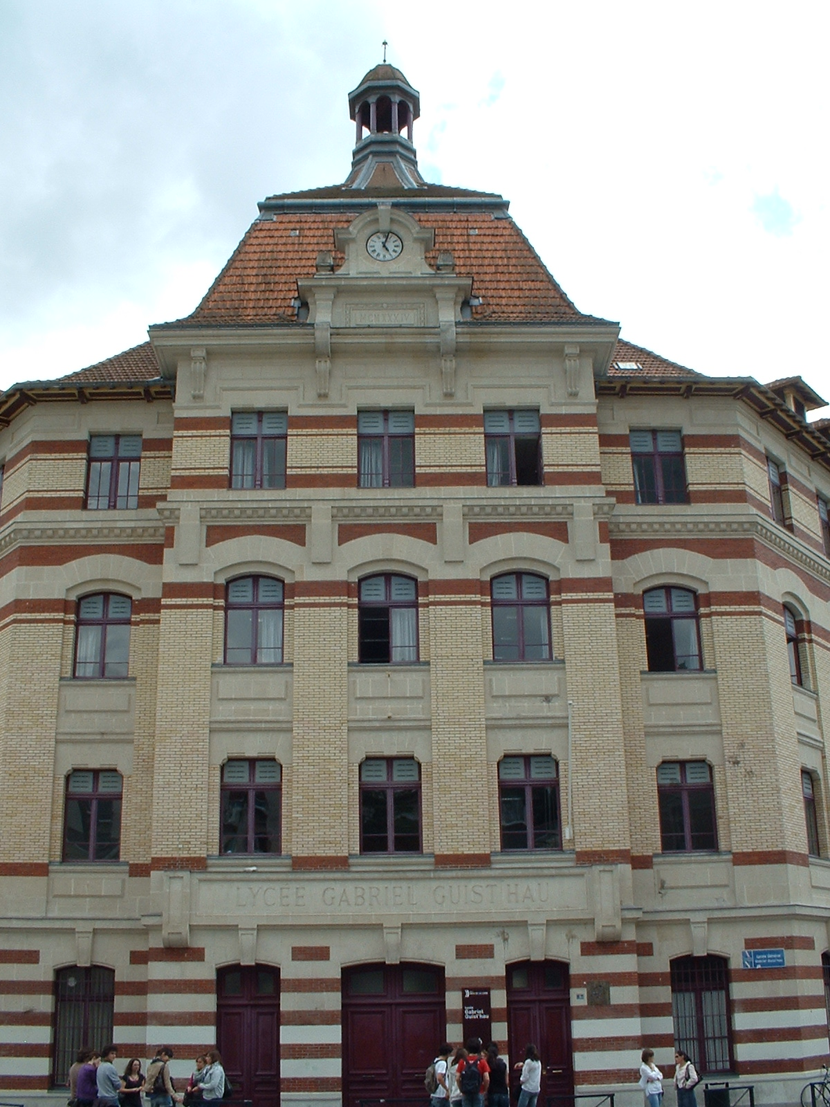 Nantes (France) - Lycée Guist'hau - Entrée